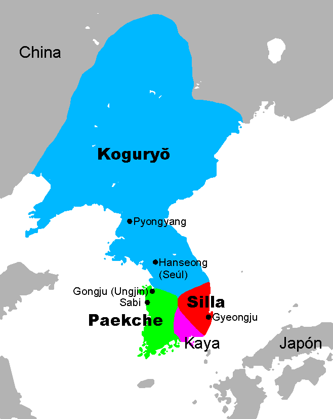 Mapa de los tres reinos de Corea. He utilizado el que ya existía en inglés, hecho por Chris 73 (Image:Three_Kingdoms_of_Korea_Map.png)